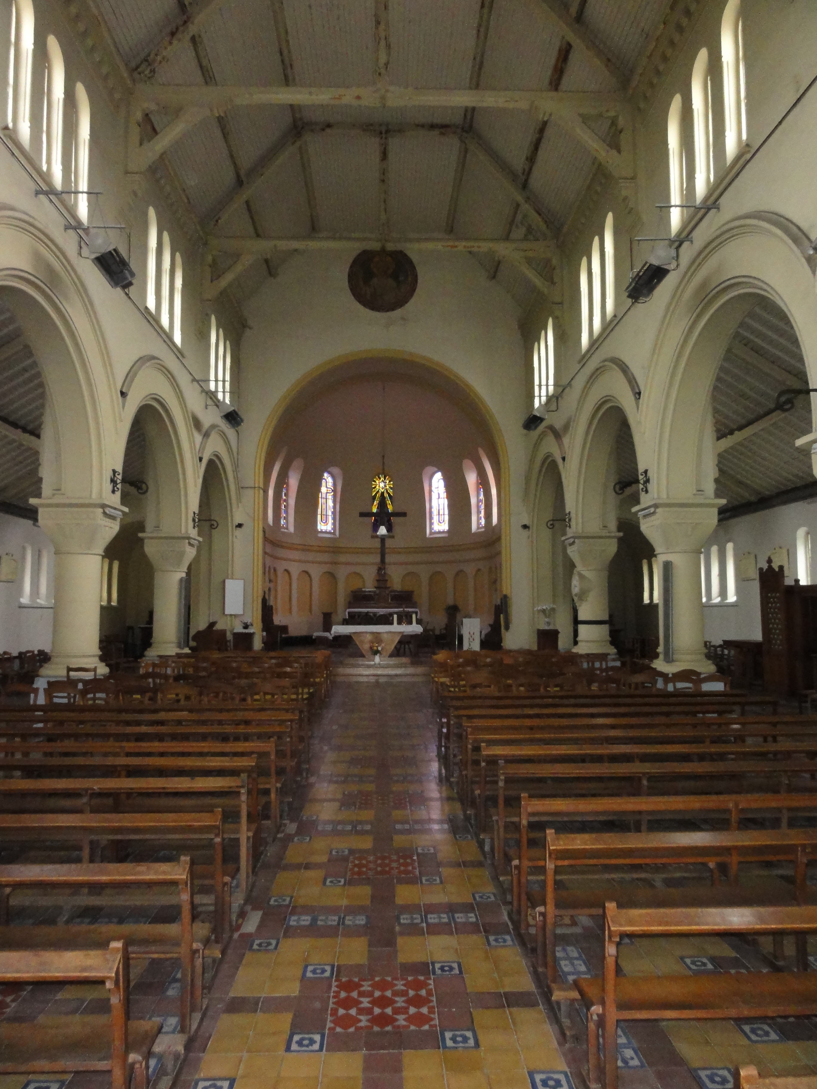 Église Saint-Édouard des cités de la Fosse n° 12 de la Compagnie des mines de Lens, Lens, Pas-de-Calais, Nord-Pas-de-Calais, France. .